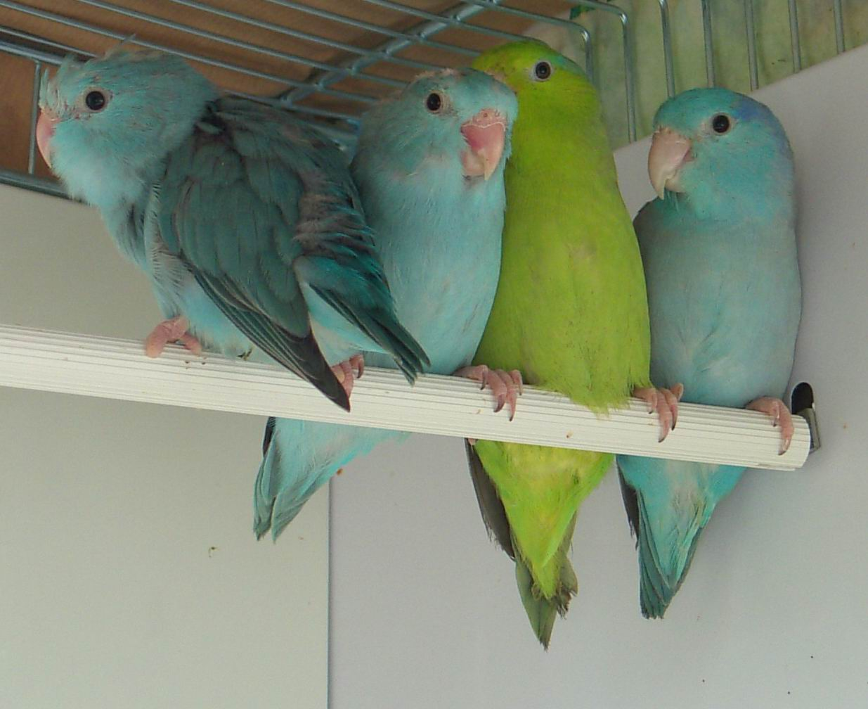 Famiglia di quattro Forpus coelestis. La verde è la madre e quello a destra il padre.